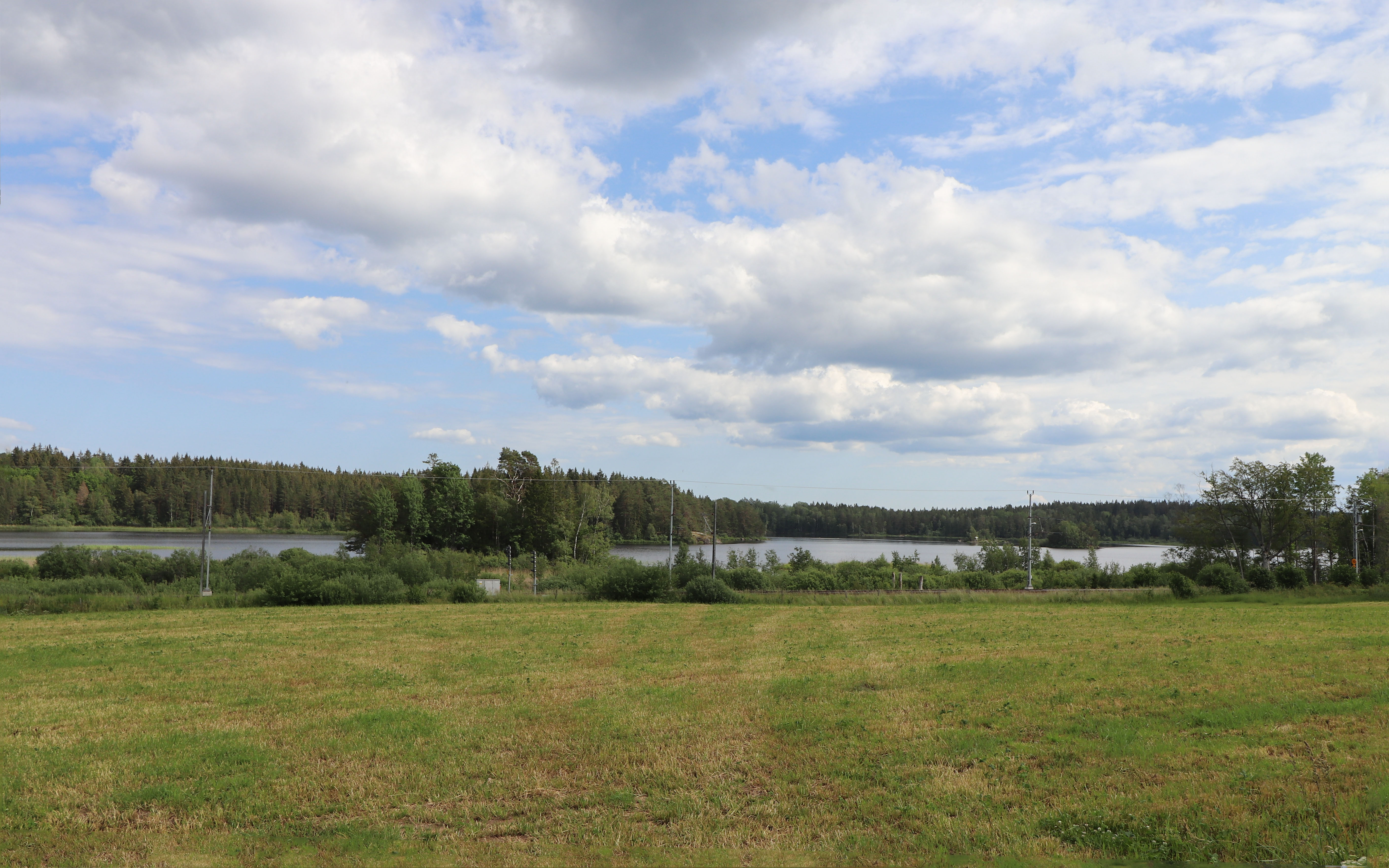 Örsjösjön är en insjö i Örsjö socken, Småland.